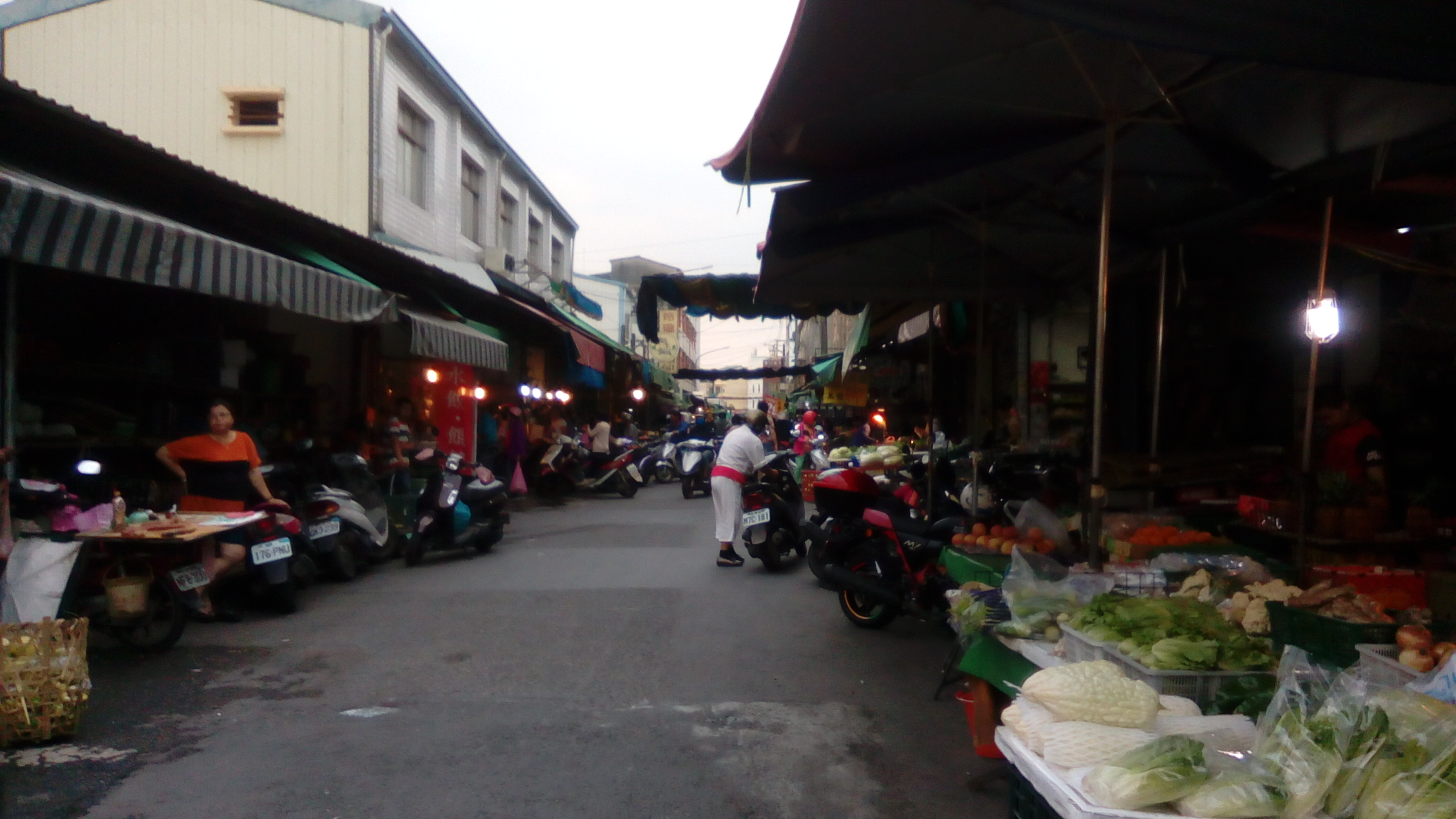 萬丹市區 元泰街及萬壽路口